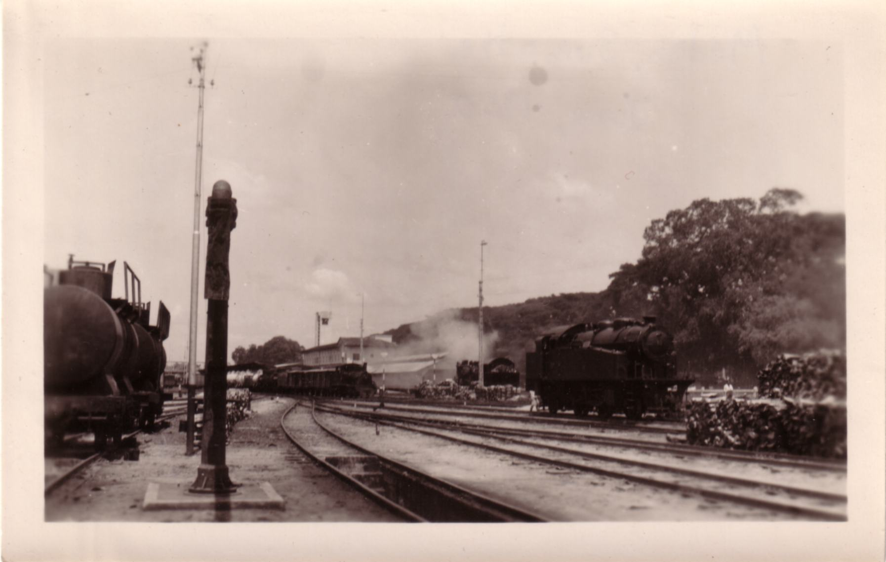 Railway yard in Medan, Sumatra.